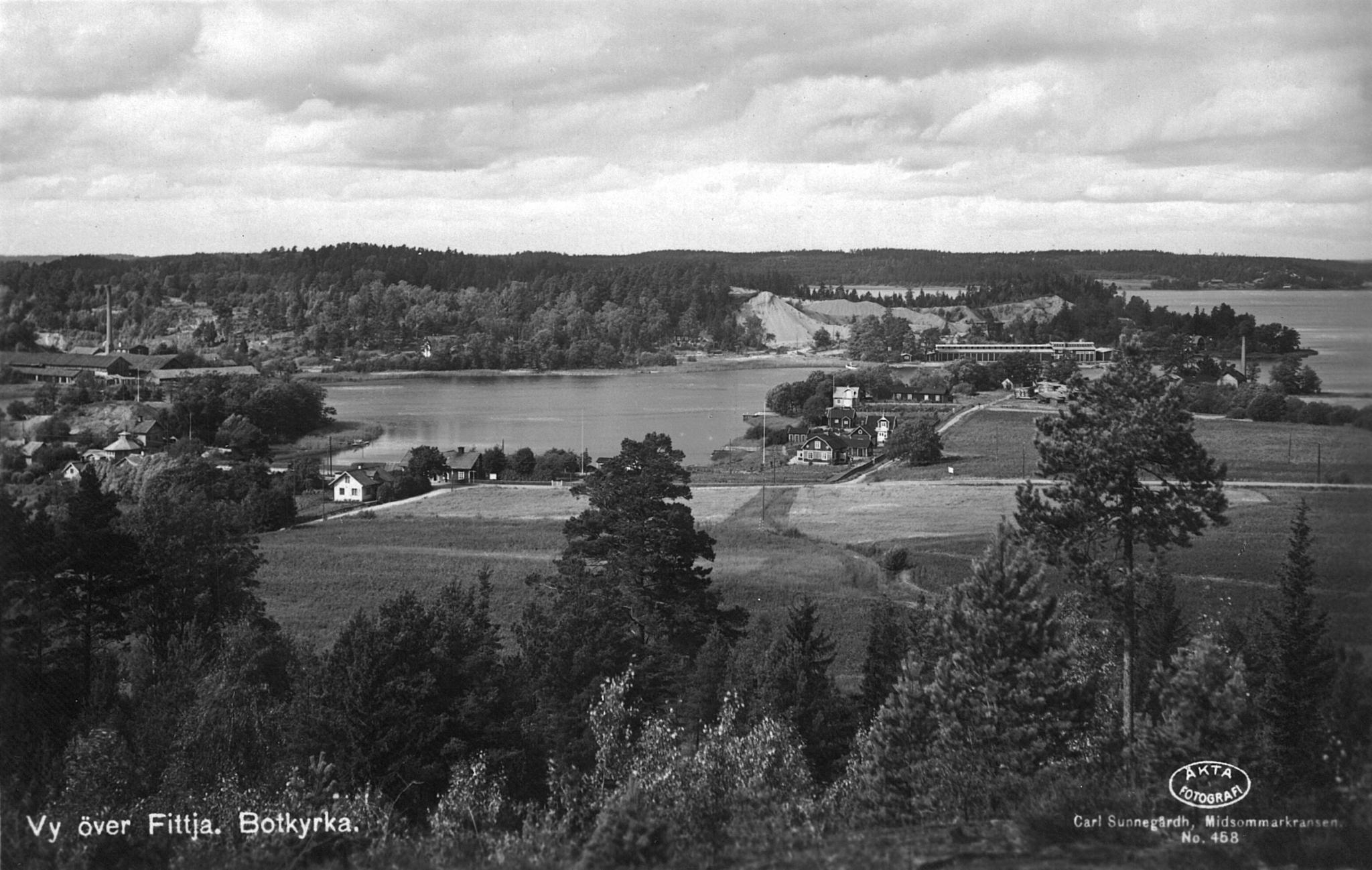 Vårby Haga, nuvarande Masmo. Troligen på 1930-talet